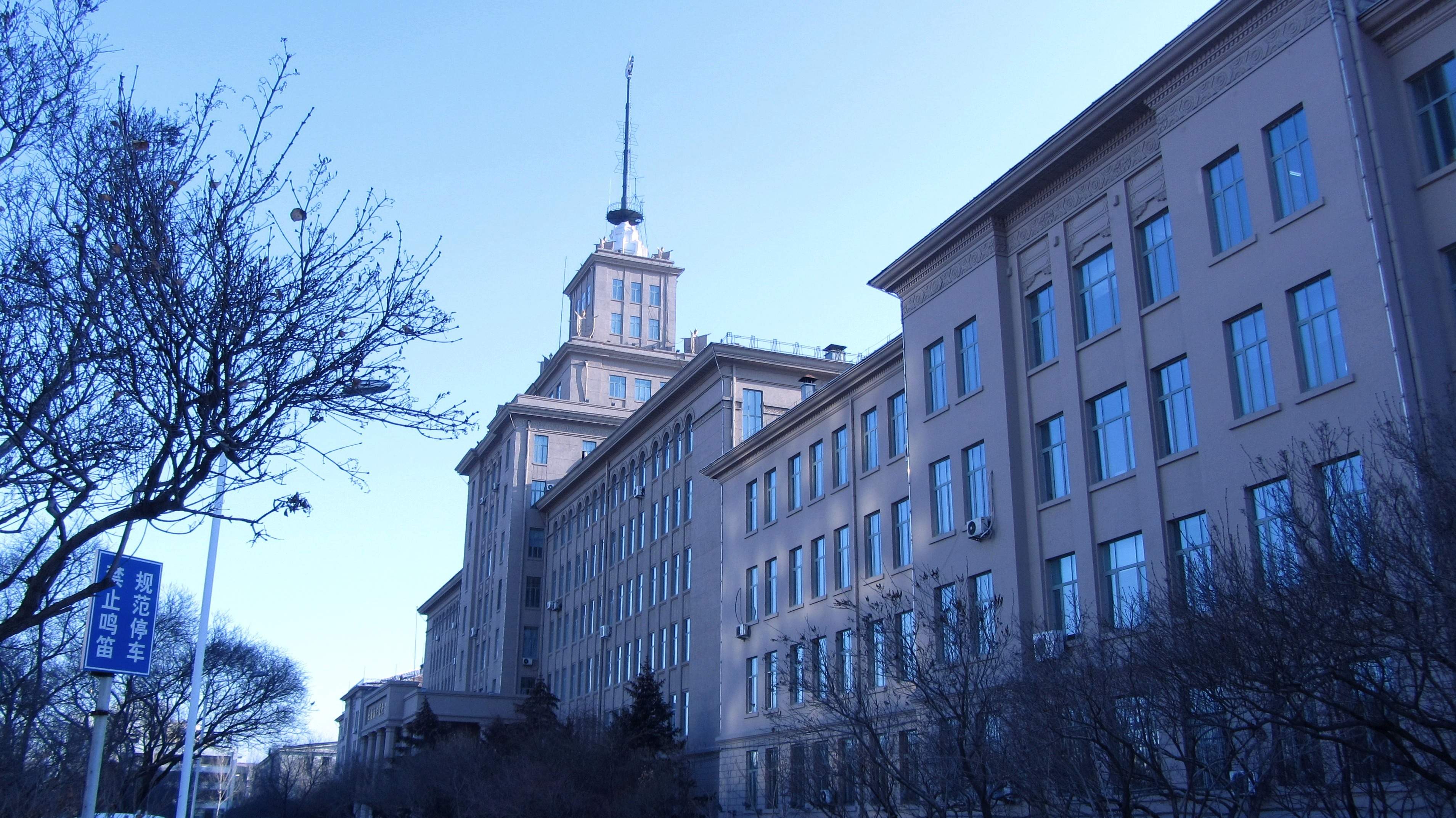 中文（中国大陆）: 哈尔滨工业大学